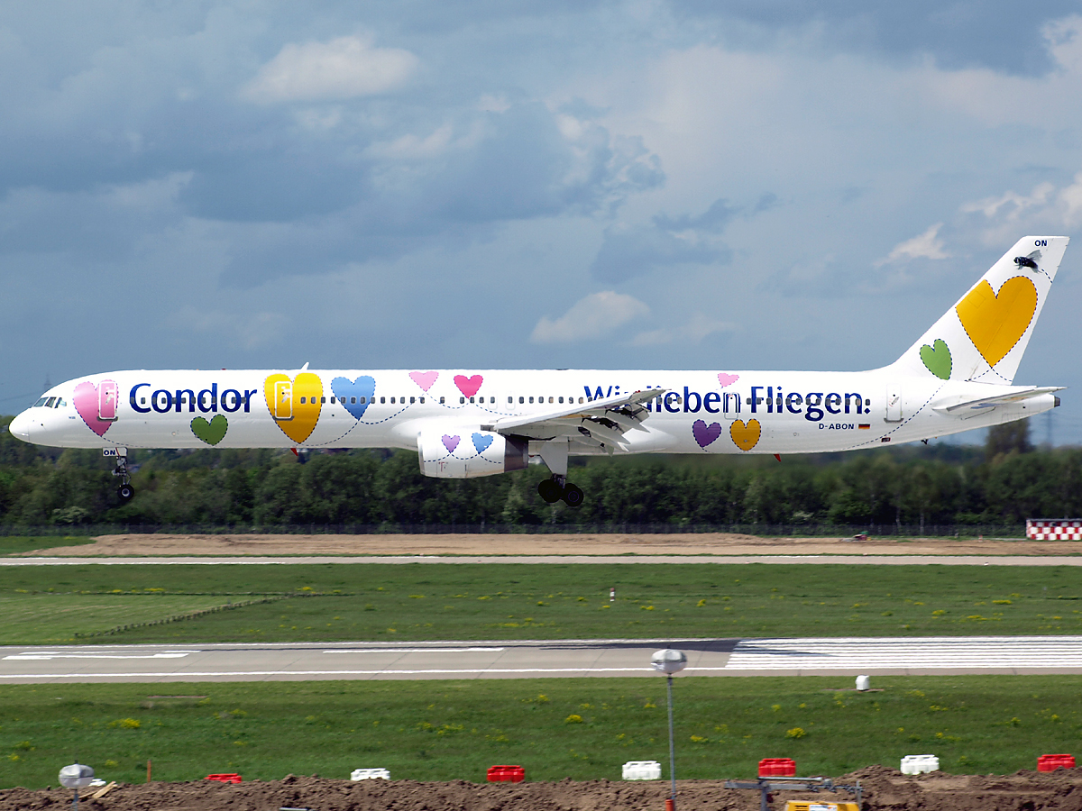 Boeing B757 der Condor in der "Willi"-Sonderlackierung